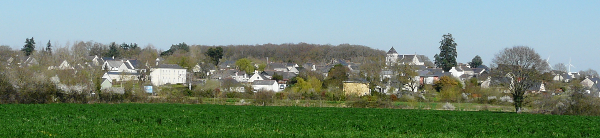 Vue d'ensemble du bourg de Puceul